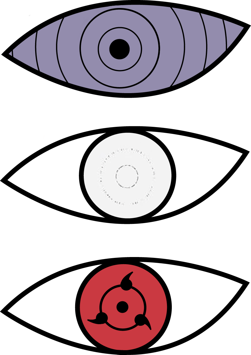 muestra los diferentes tipos de doujutsu que existen en la serie de naruto